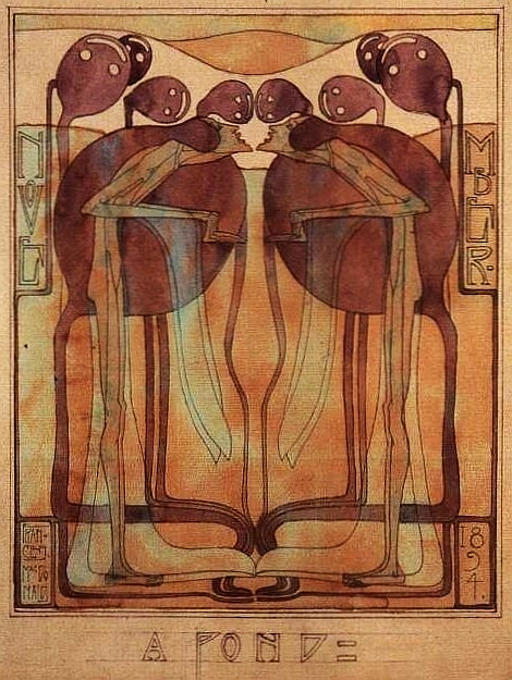 A Pond